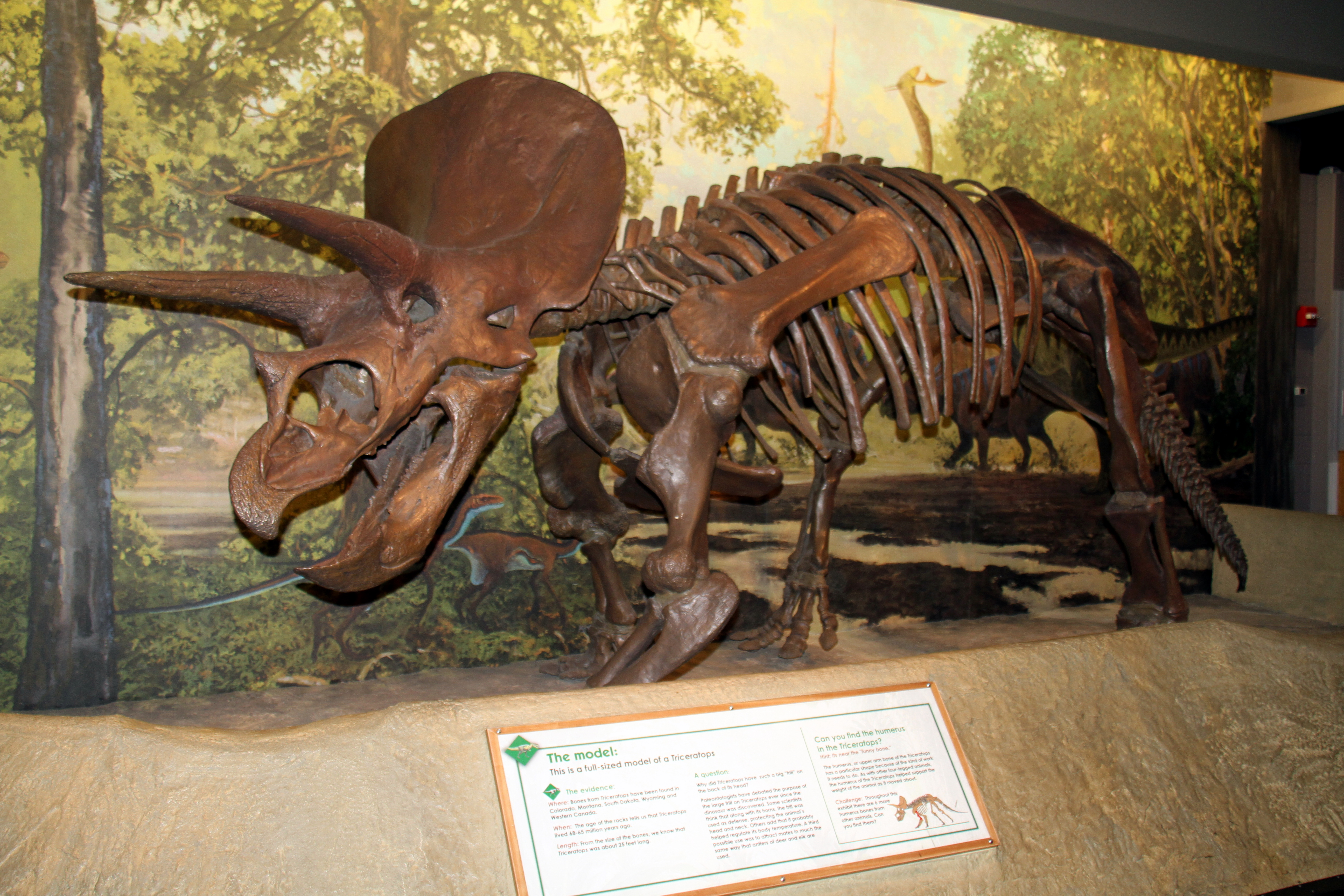 ട്രൈസെറാറ്റോപ്സ് മോഡൽ